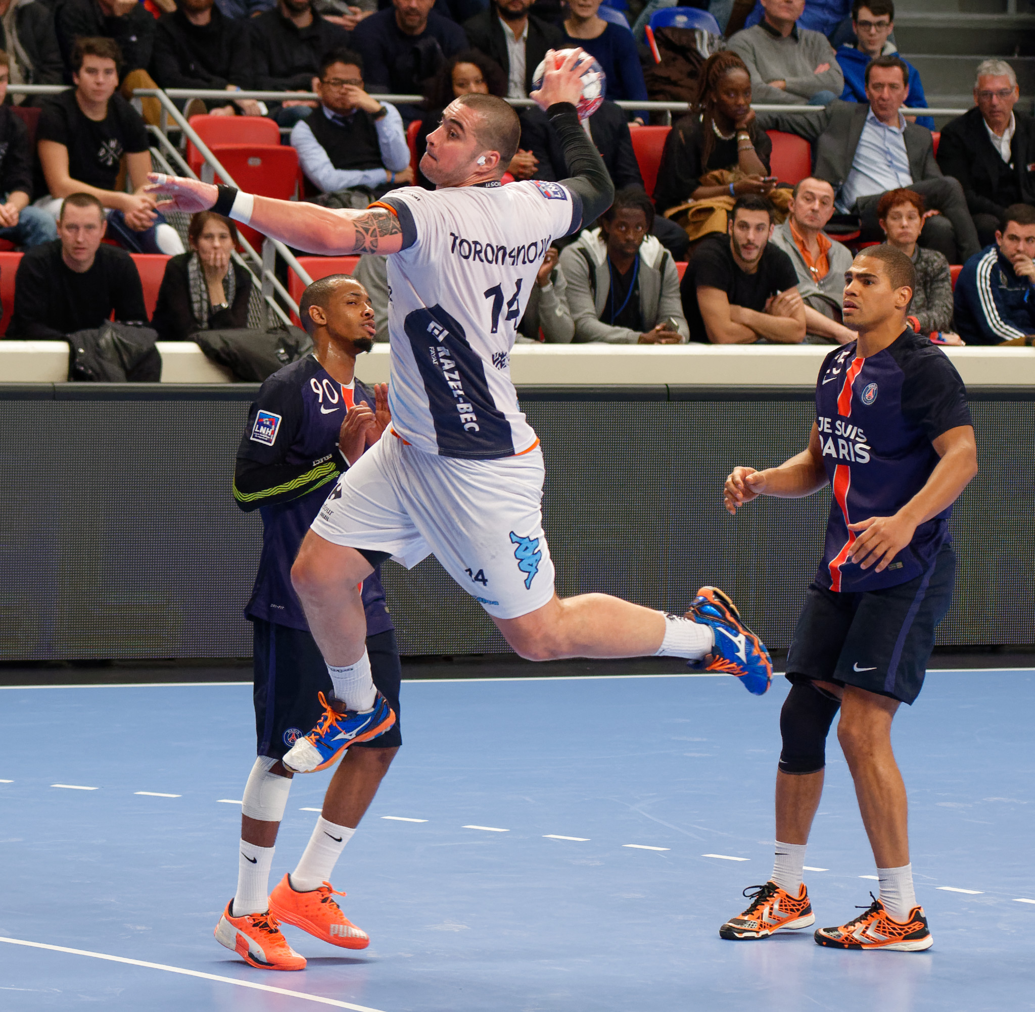 Rencontre de LNH entre le PSG et l'US CRéteil. A Coubertin, le 25 novembre 2015.